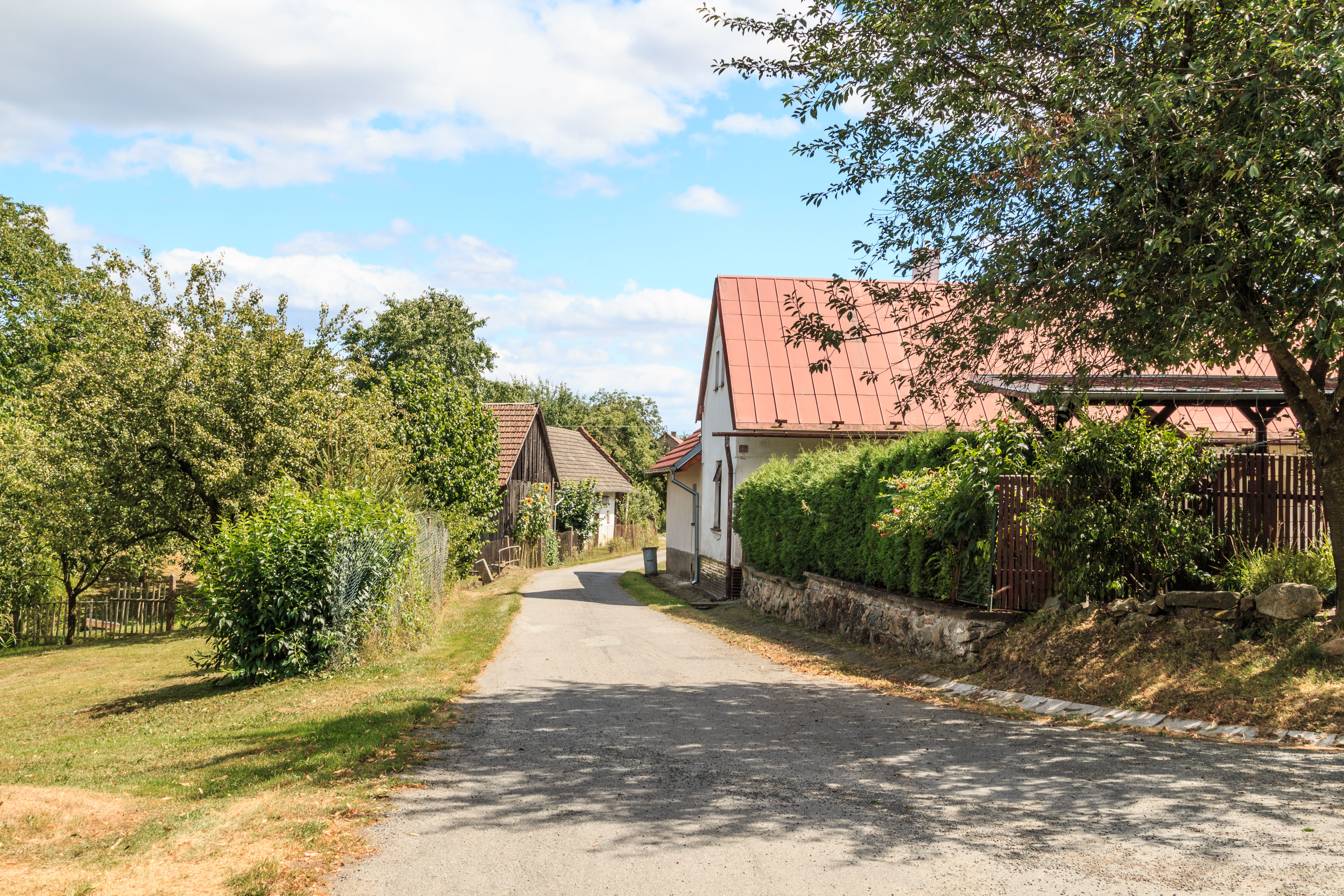 Bučovice čp. 6